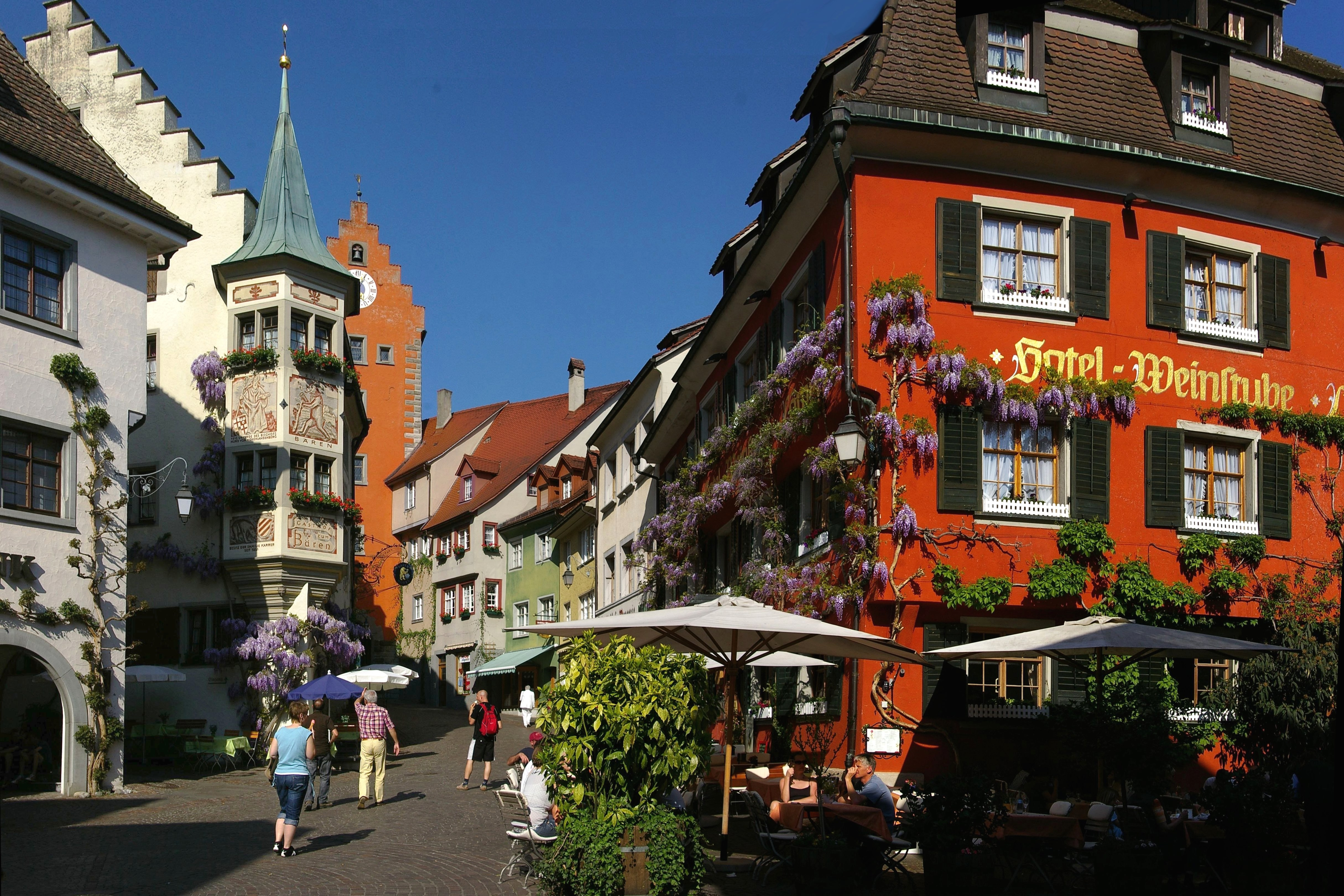 Meersburg - Innenstadt, Blick zum Obertor